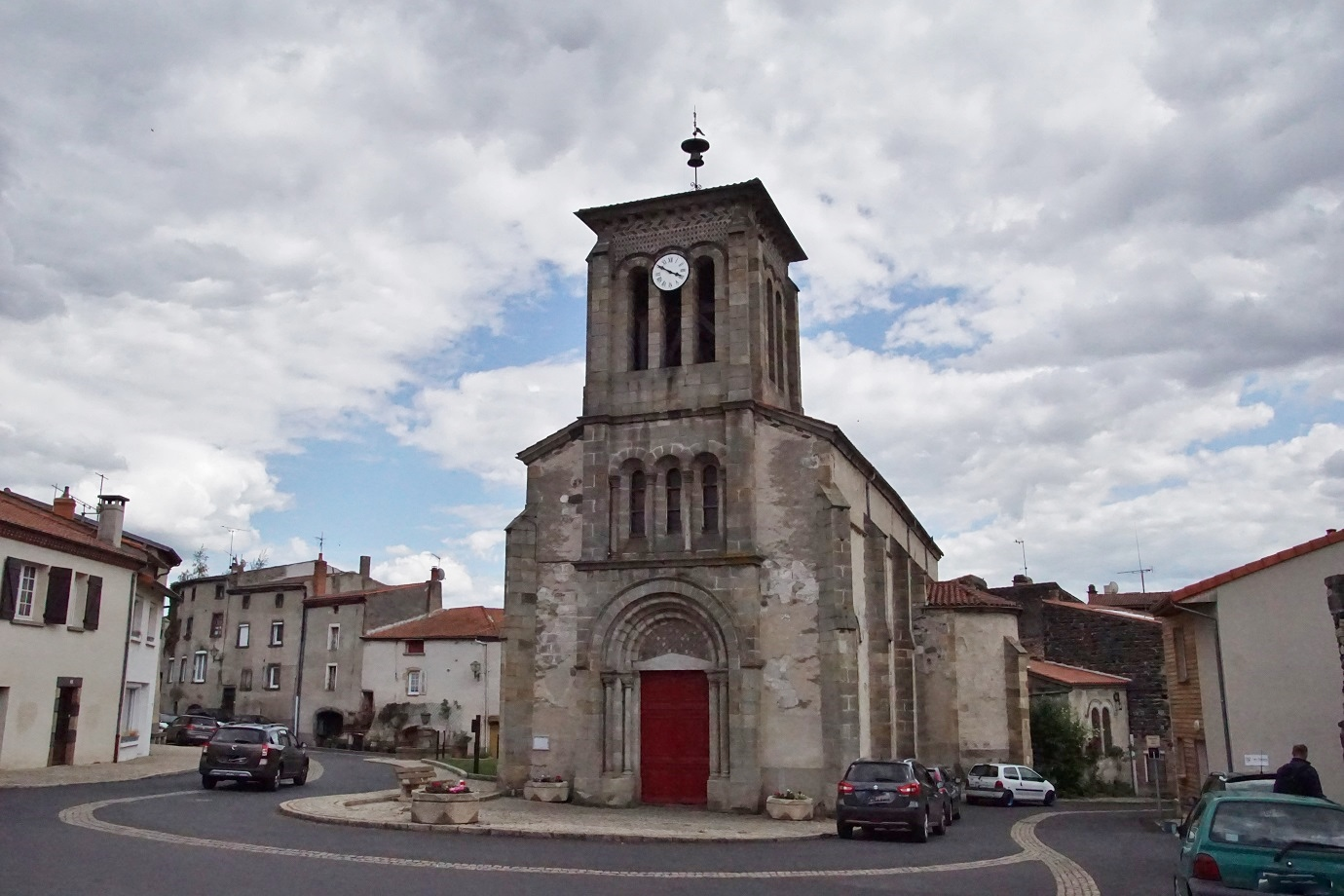 Puy de Dôme